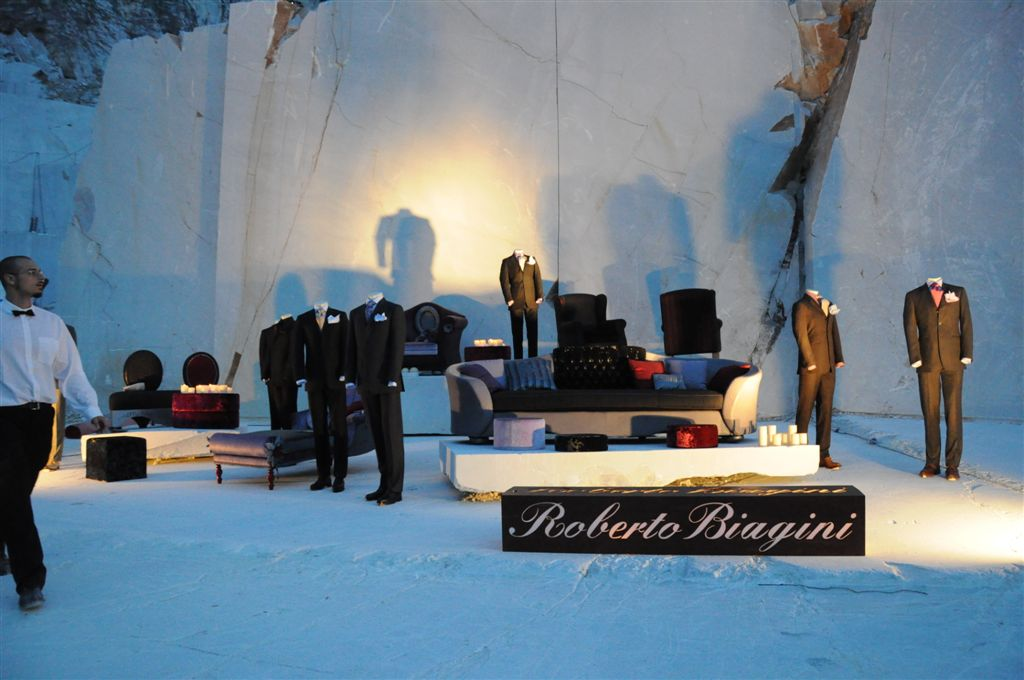 Esposizione e sfilata presso le cave di Michelangelo (Polvaccio) a Carrara, in occasione dell'evento "Alla Luna"